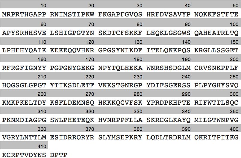 Es pot observar la seqüència d'aminoàcids de LEM pels ratolins, té una longitud de 414 aminoàcids.